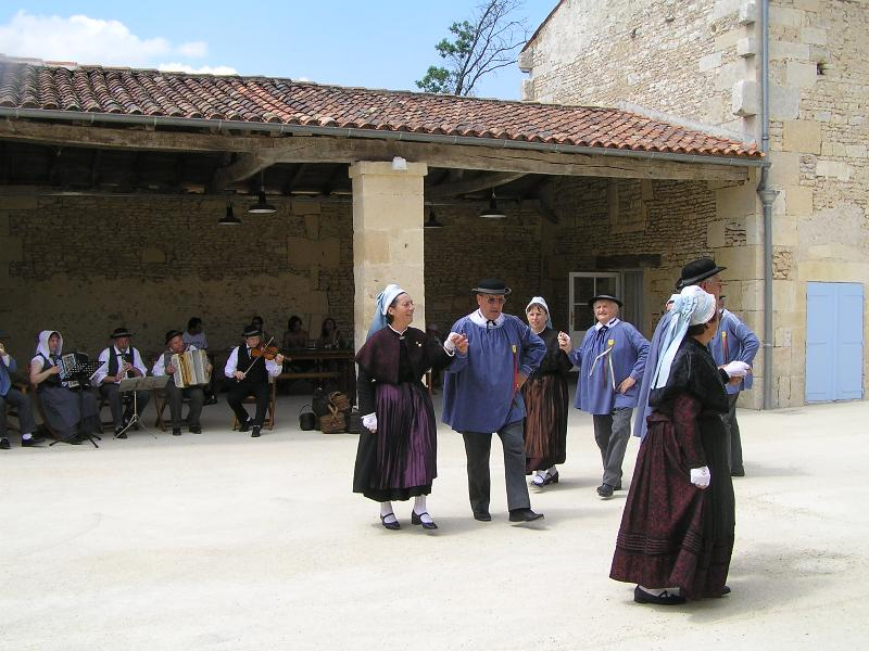 les gars d'o pays bas au moulin de Preziers